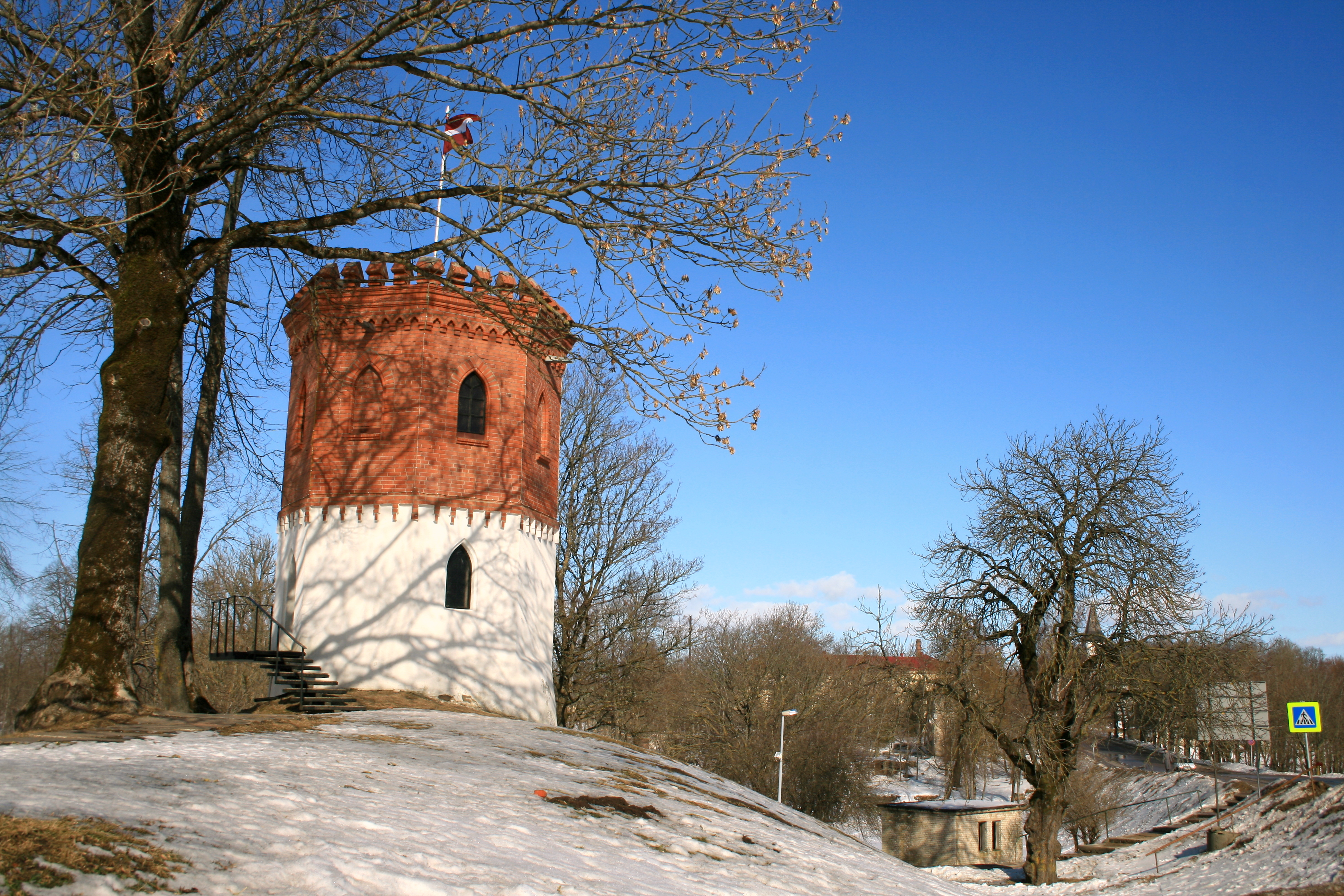 Priekule tower